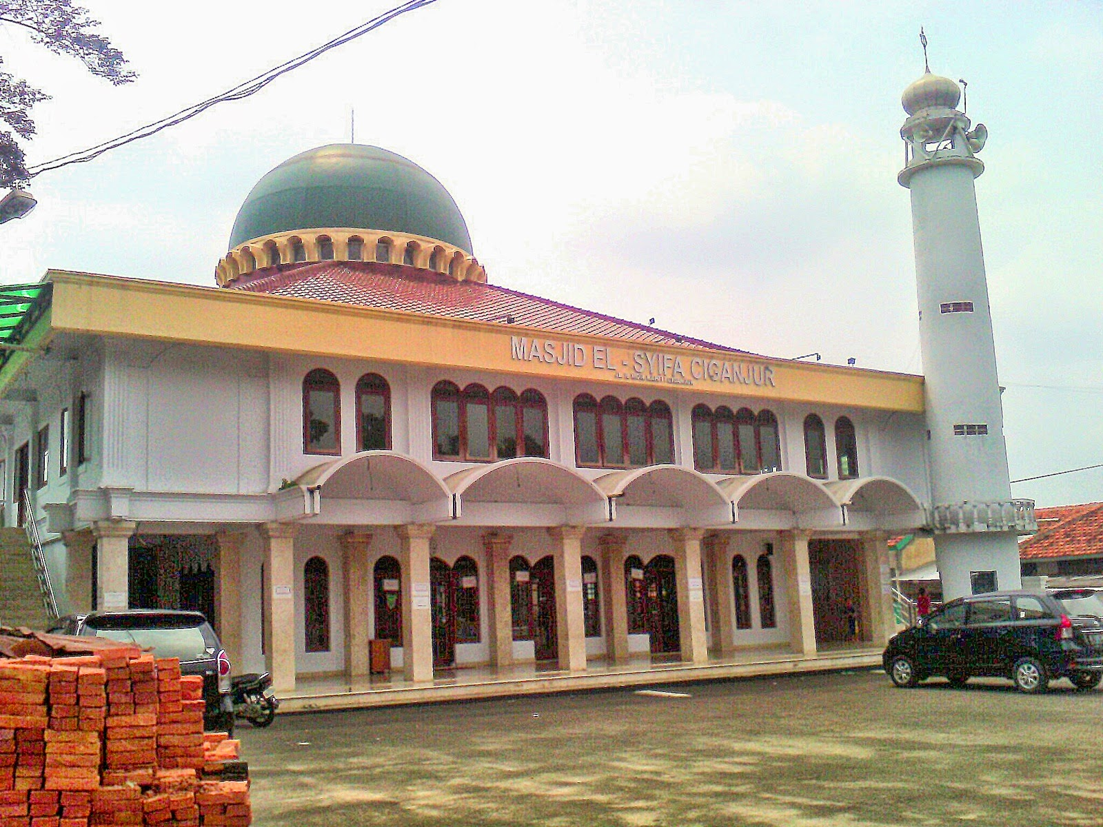 Masjid El-Syifa, Jagakarsa, South Jakarta